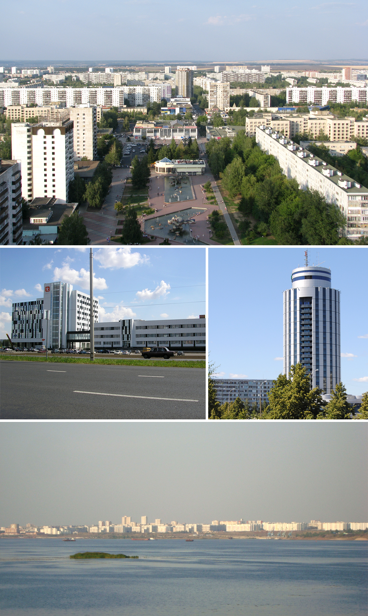 File:Naberejnie_Chelny.JPG File:Энтузиастлар_бульвары2.jpg File:Чаллы_бизнес_үзәге.jpg